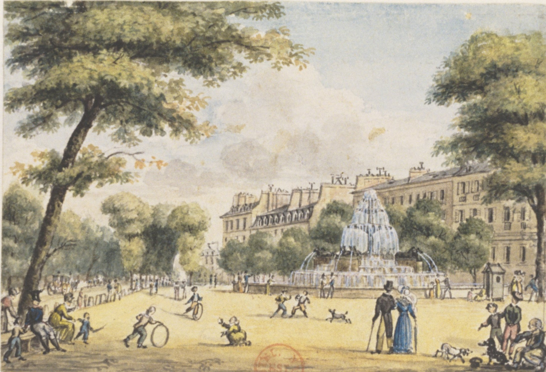 Fontaine du Château-d'Eau, place de la République, Paris 10e.